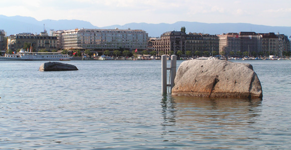 Les Pierres du Niton dans la Rade de Genève, Geneva - Switzerland.